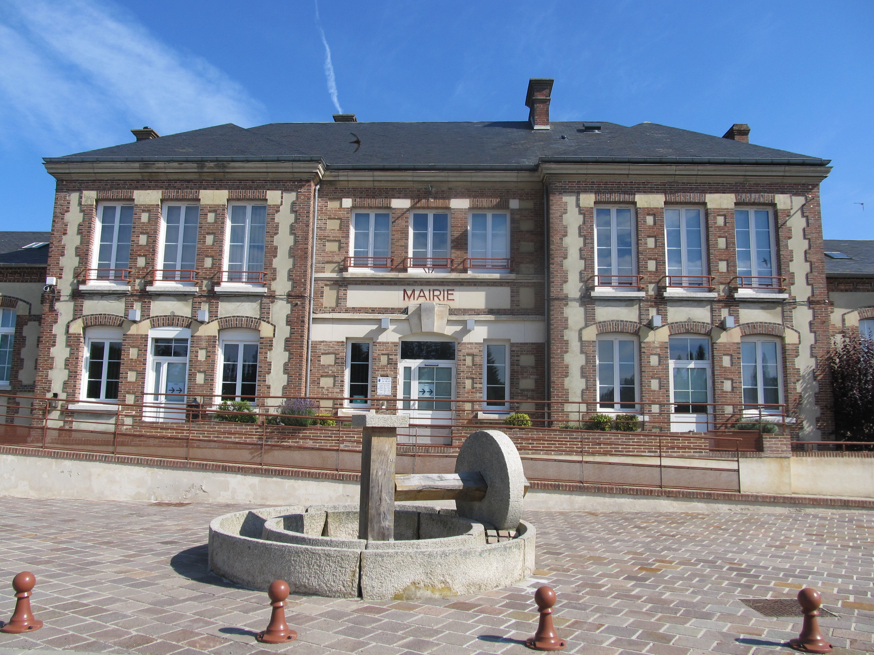 Mairie de Rai